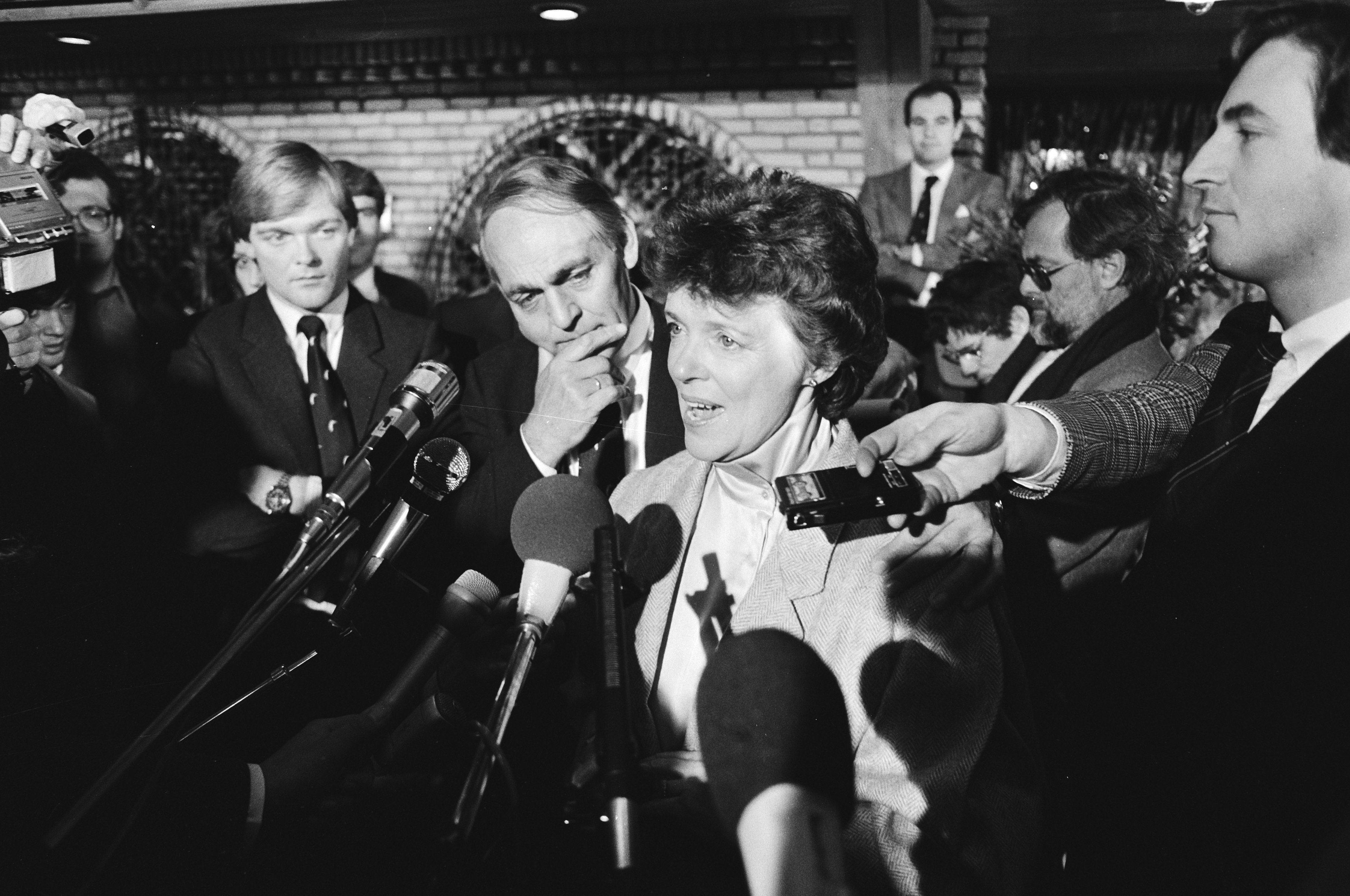 Collectie / Archief : Fotocollectie Anefo Reportage / Serie : Ontvoerde mevrouw Van der Valk terug in Nuland na haar vrijlating Beschrijving : Tijdens haar verklaring voor de pers Datum : 18 december 1982 Locatie : Noord-Brabant, Nuland Trefwoorden : ontvoeringen, persconferenties Persoonsnaam : Valk, Gerrit van der, Valk, Toos van der Fotograaf : Croes, Rob C. / Anefo Auteursrechthebbende : Nationaal Archief Materiaalsoort : Negatief (zwart/wit) Nummer archiefinventaris : bekijk toegang 2.24.01.05 Bestanddeelnummer : 932-4426